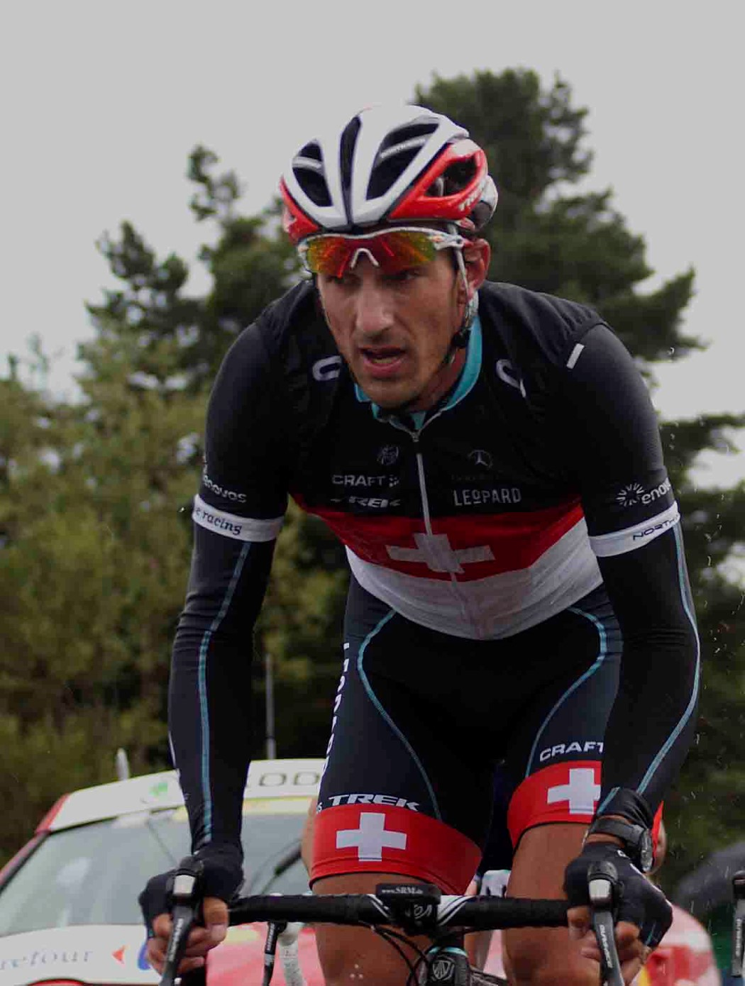 col de manse 088 cancellara